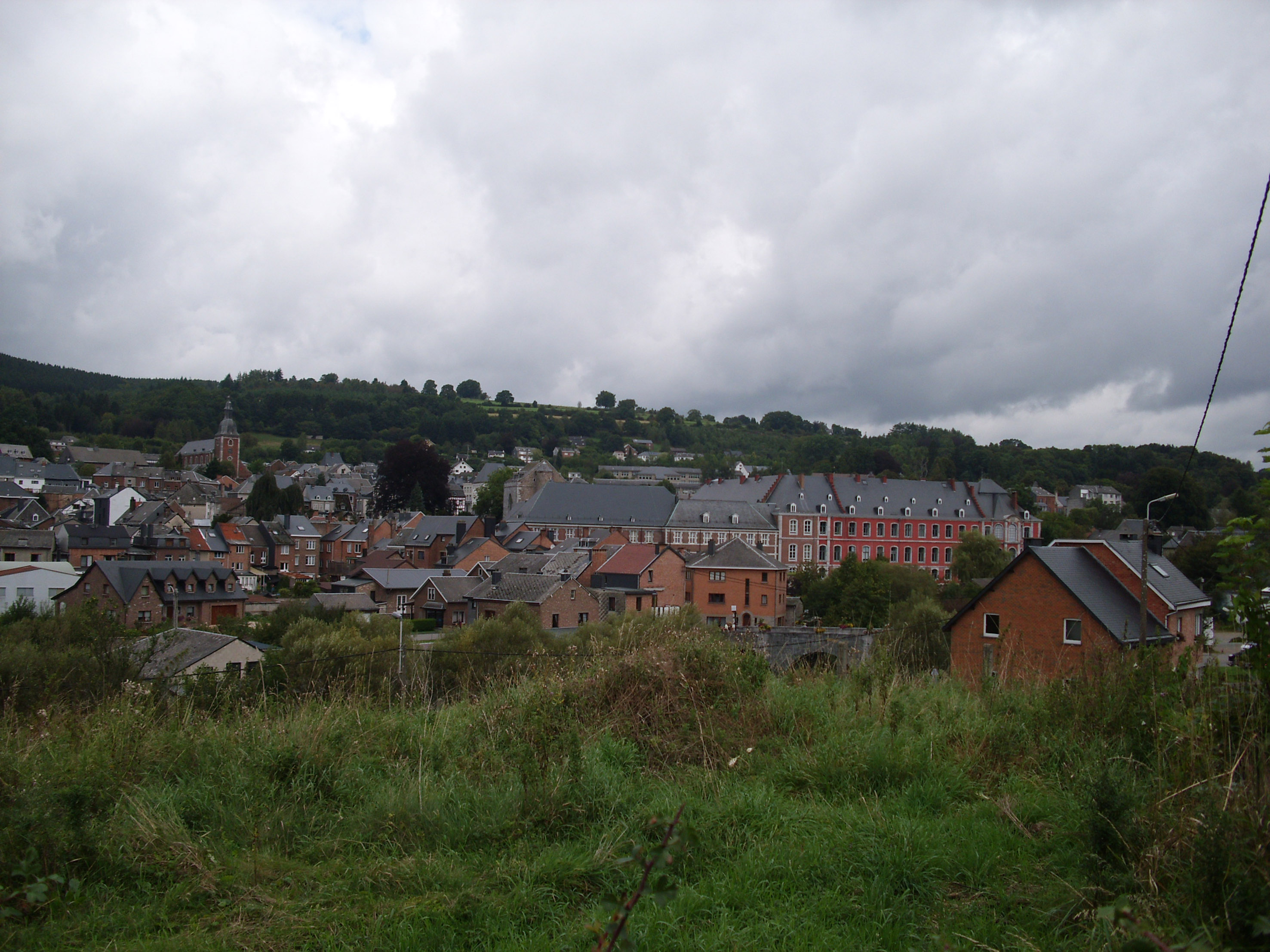 Algemeen beeld van Stavelot - Provincie Luik - België